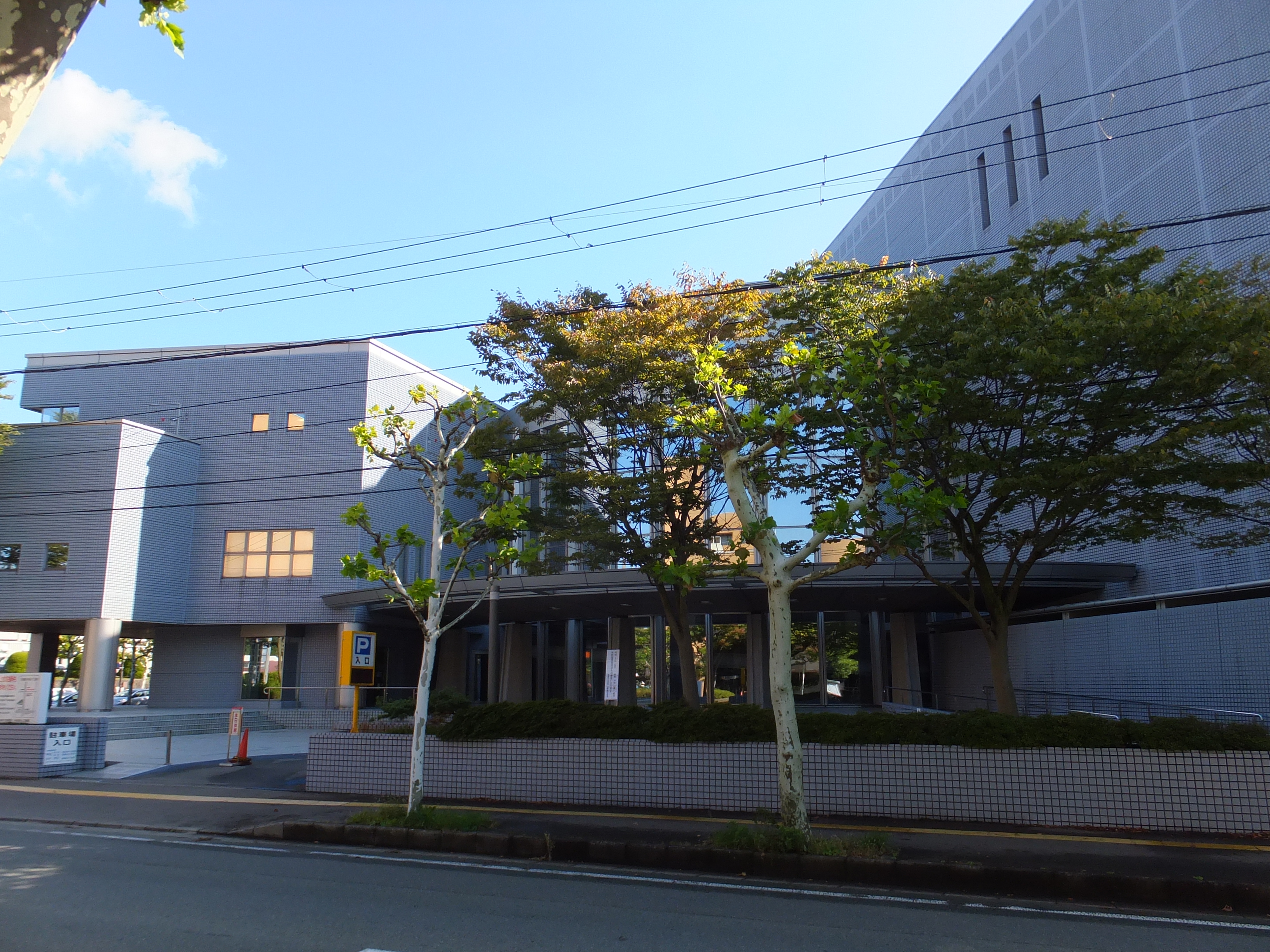 秋田県立図書館、秋田県公文書館Fujifilm FinePix F770EXR